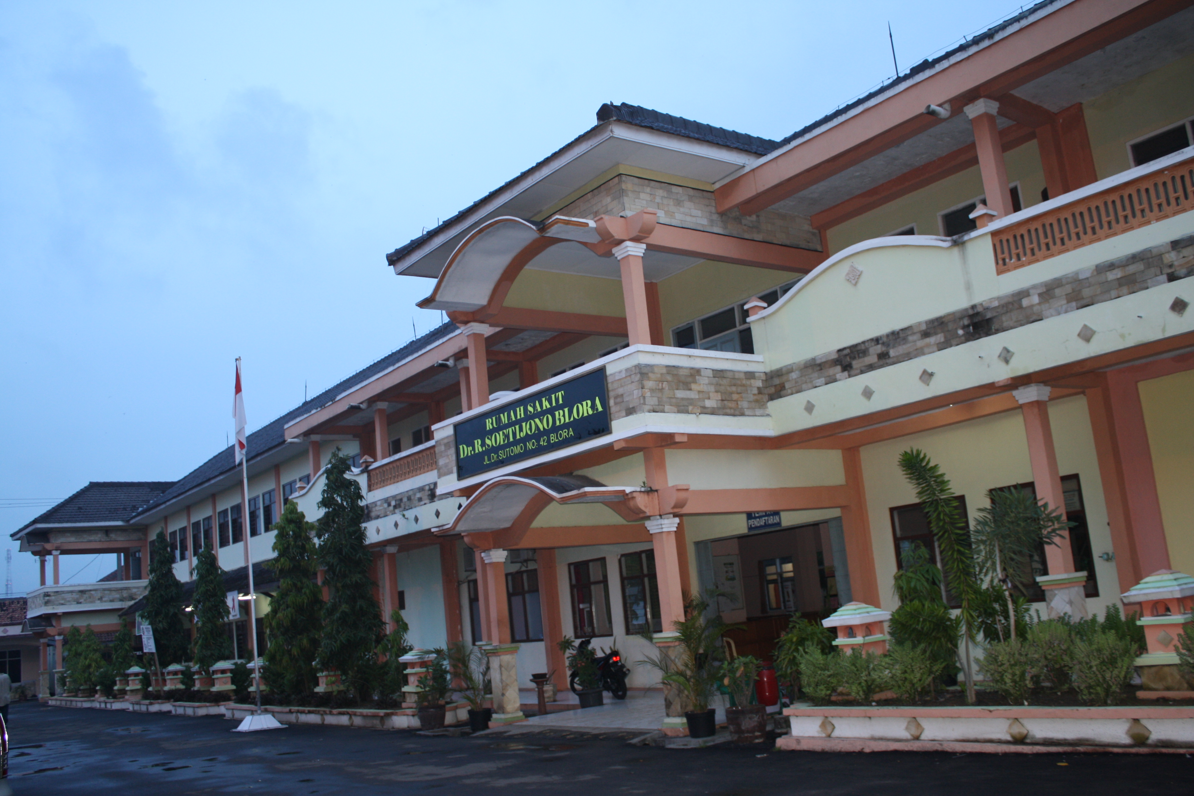 RSUD Blora adalah salah satu rumah sakit umum yang ada dikabupaten Blora Jawa Tengah